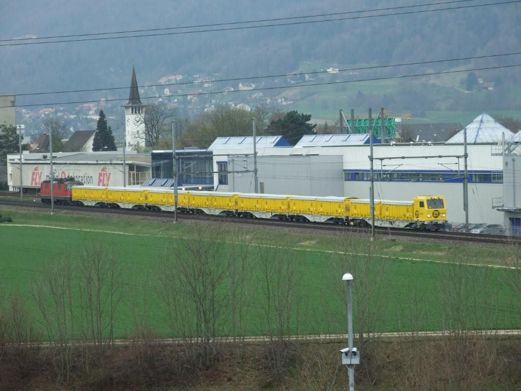 Neuer Kurzzug für Baufirma im Einsatz am 08.04.2009